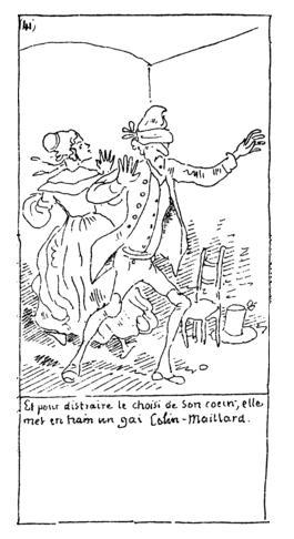 Een tekening uit 1840, auteur in 1889 gestorven: Jan Goeverneur